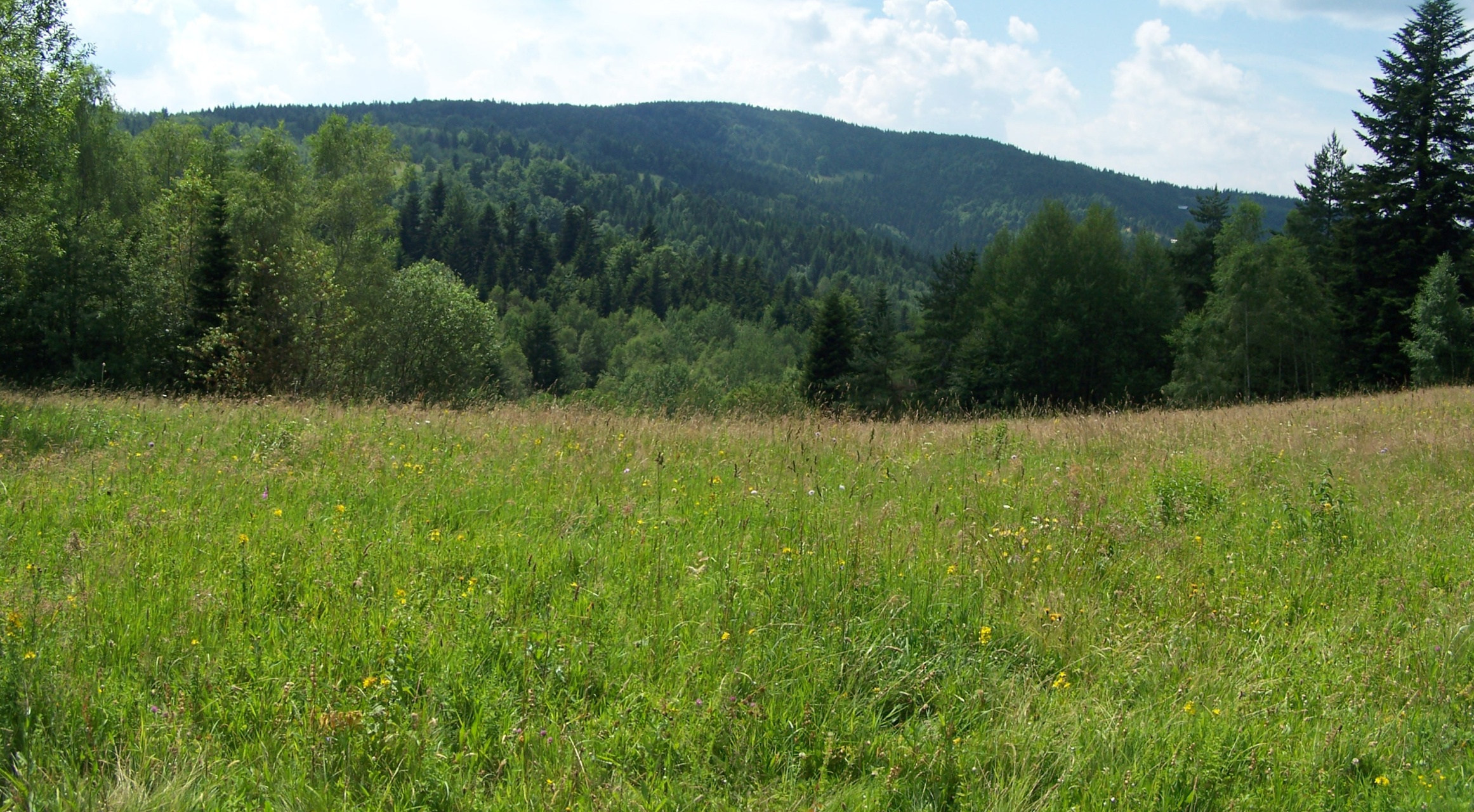 Eliaszówka. Widok z zielonego szlaku z Piwnicznej na Eliaszówkę